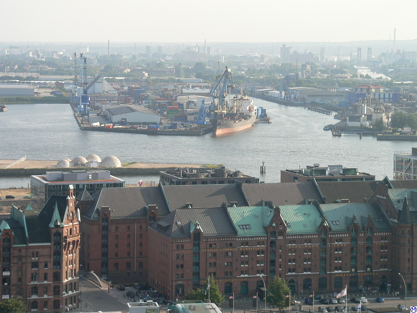 Blick vom Nikolaiturm Richtung Süden; über die Speicherstadt, HafenCity, Strandkai auf den Kleinen Grasbrook mit Südwesthafen (links) und Steinwerder Hafen (rechts) Hamburg's Speicherstadt (meaning: "warehouse city") ist the world's largest warehouse complex. It's grounded on oak foundations, built in 1888 and since 1991 it is declared a historic monument. This is a photograph of an architectural monument. 11867 11886 11975-11977 12072-12086 12091 12189-12200 12276-12279 12333-12336 12415-12475 12477-12489 12498-12501 12879-12886 13378 13725-13729 14151 14794 14863-14864 14879-14896 14969-14978